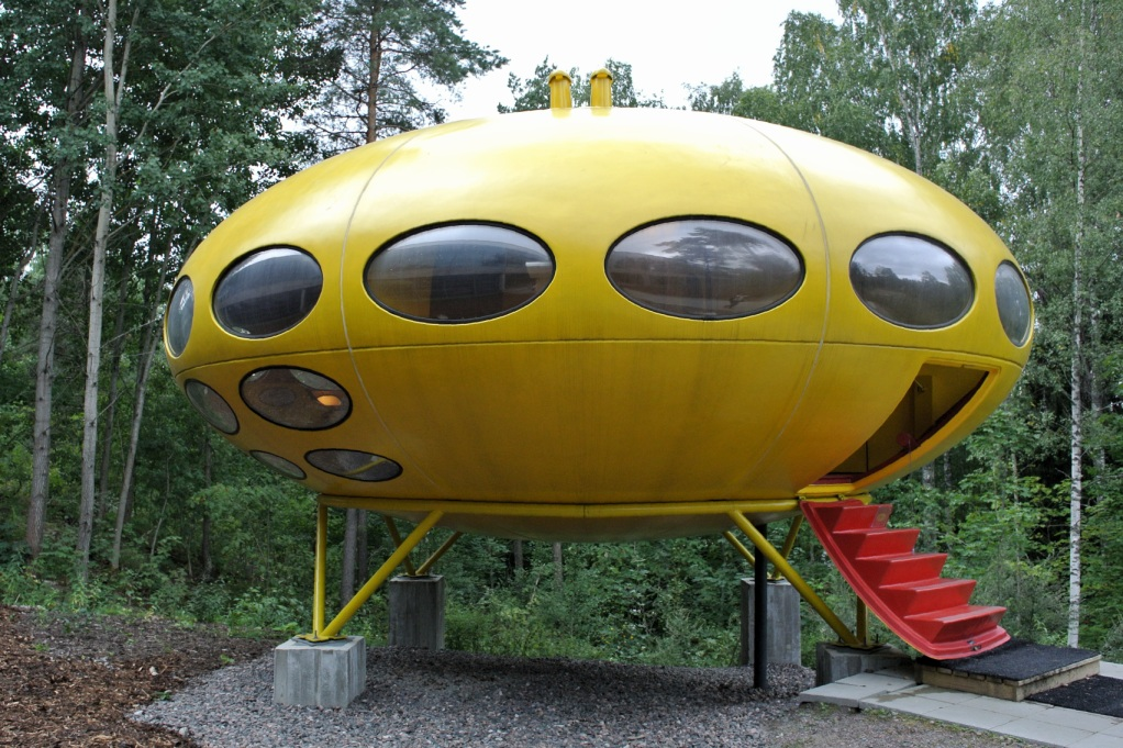 Futuro-talo näyttelykeskus WeeGeen pihalla Espoon Tapiolassa.